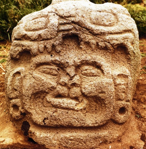 Cabeza del Preclasico Tardio, 1995, ahora en museo Nacional de Guatemala